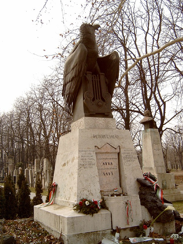 A Petőfi (Petrovics) család sírja. Petőfi István, Petrovics (Szabadszállás, 1825. aug. 18. – Csákó, 1880. máj. 1.) Petőfi Sándor öccse. Petőfi Zoltán (Debrecen; 1848. dec. 15. – Pest, 1870, nov. 15.) Petőfi Sándor fia. Szendrey Júlia, Petőfi Sándorné (Keszthely, 1828. dec. 29. – Pest, 1868. szept. 6.) író. Kerepesi temető: 17/1-1-1. Szobrász: Bory Jenő.